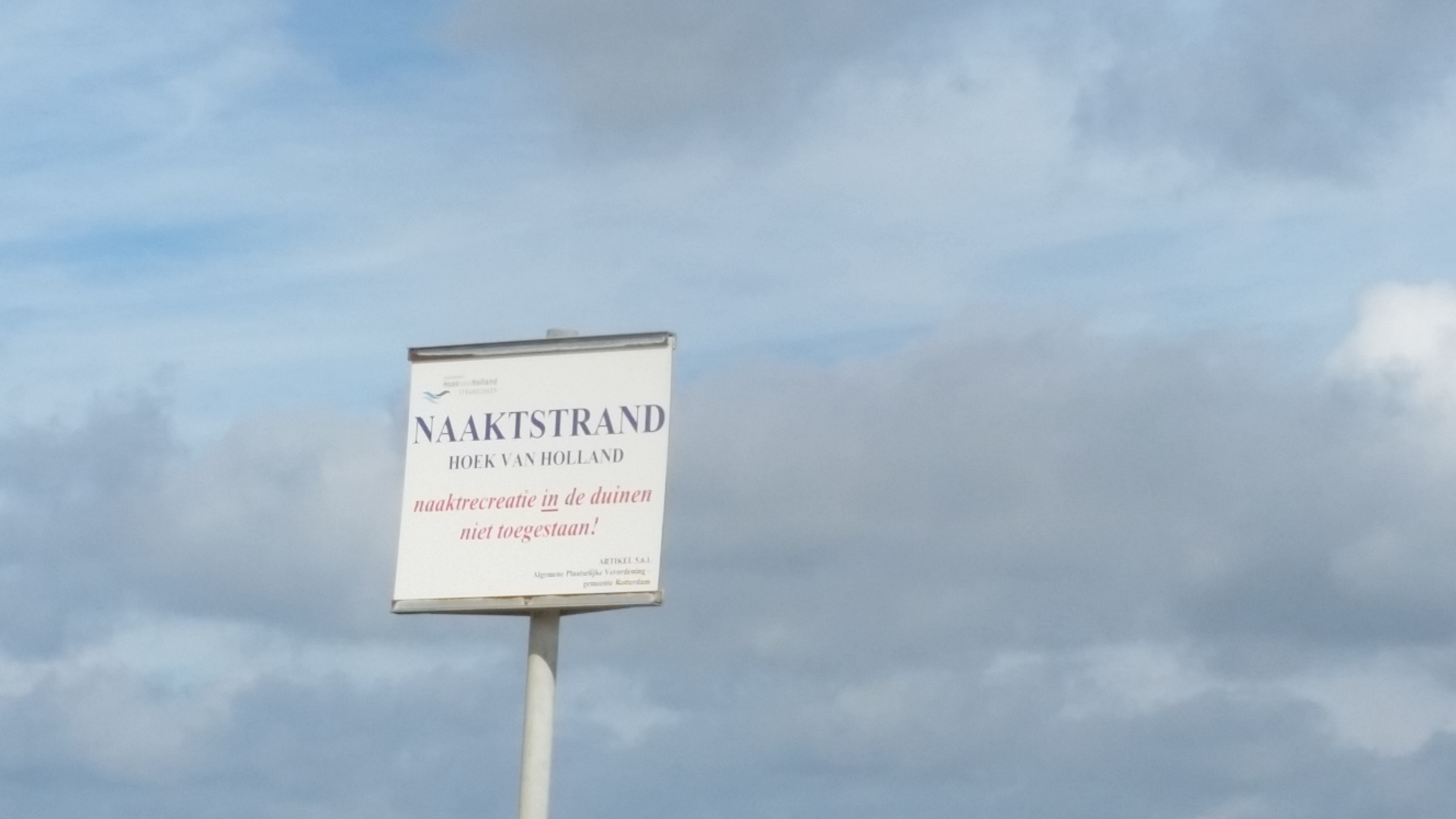 Bord aan de rand van het naaktstrand van Hoek van Holland